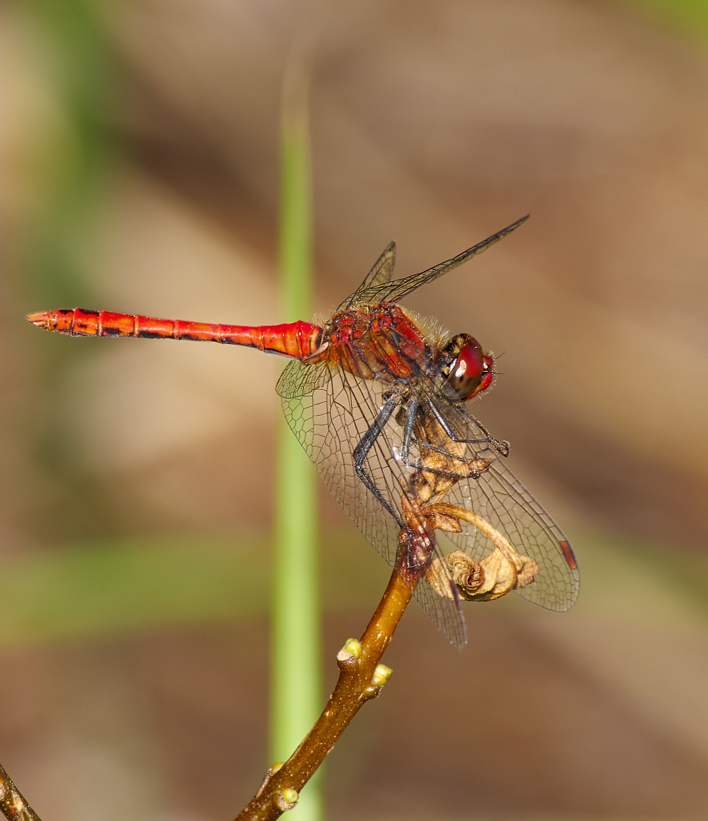 Blutrote Heidelibelle - Sympetrum sanguineum, Männchen. Aufgenommen am Anglersee in Hüttenfeld, Lampertheim, Hessen, Deutschland.